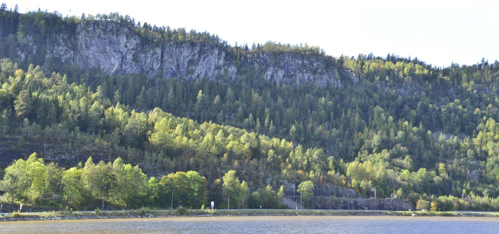 Deler av Holmestrandsveggen er vernet i Bogen naturreservat.